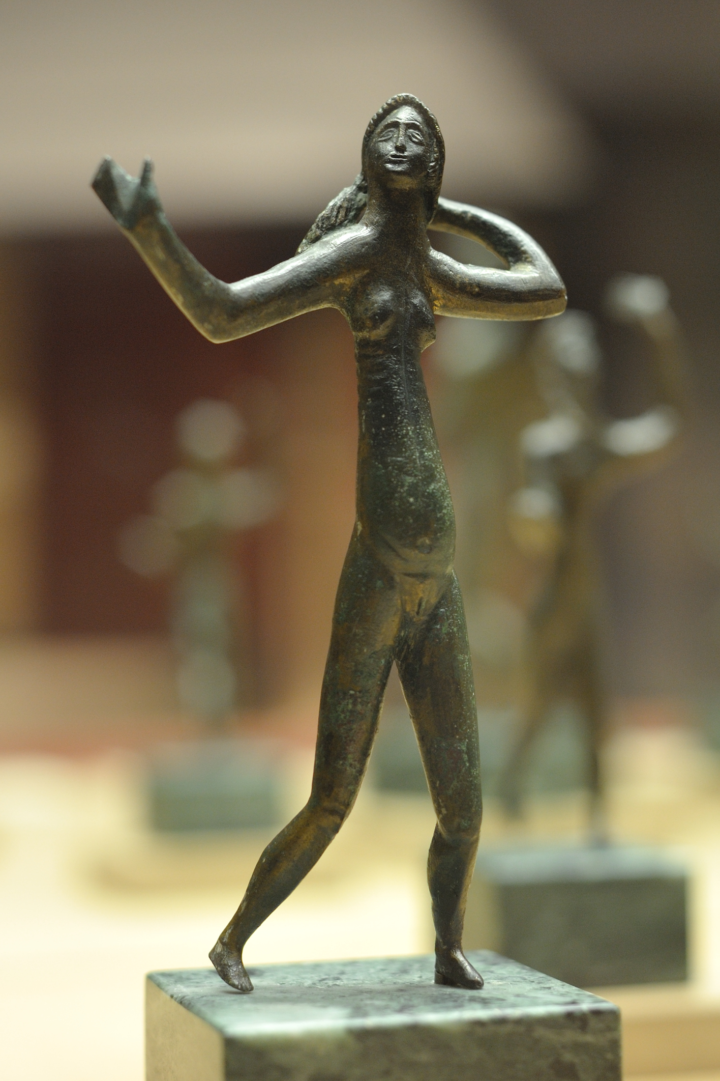 Femme nue dite la grande danseuse, statue en alliage cuivreux de la période Ier siècle av. J.-C. - Ier siècle ap. J.-C., découverte à Neuvy-en-Sullias en 1861 et exposée au musée historique et archéologique de l'Orléanais, Orléans, Loiret, France